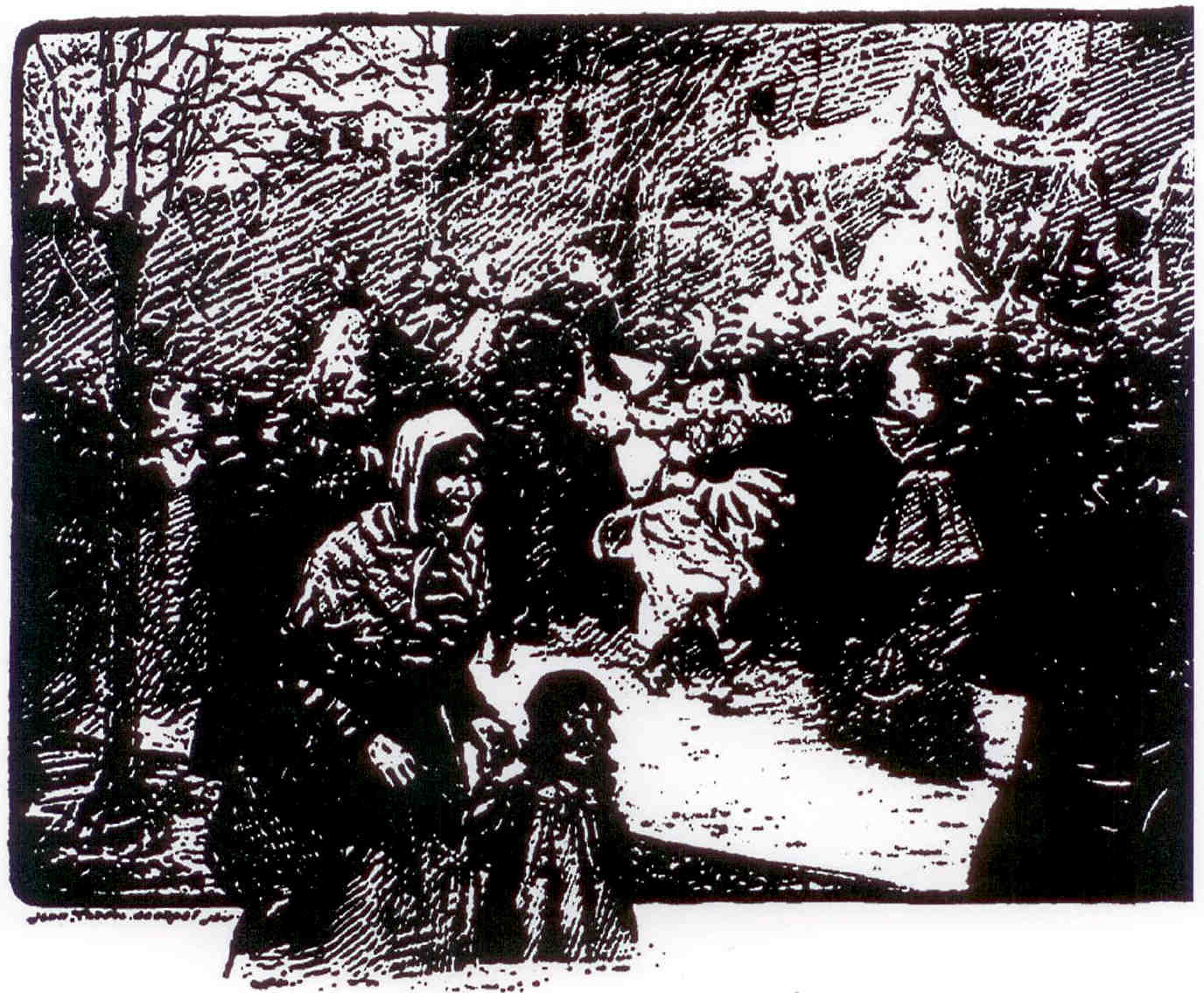 Une femme pauvre avec son enfant passe devant la foule en liesse de la Mi-Carême à Paris.